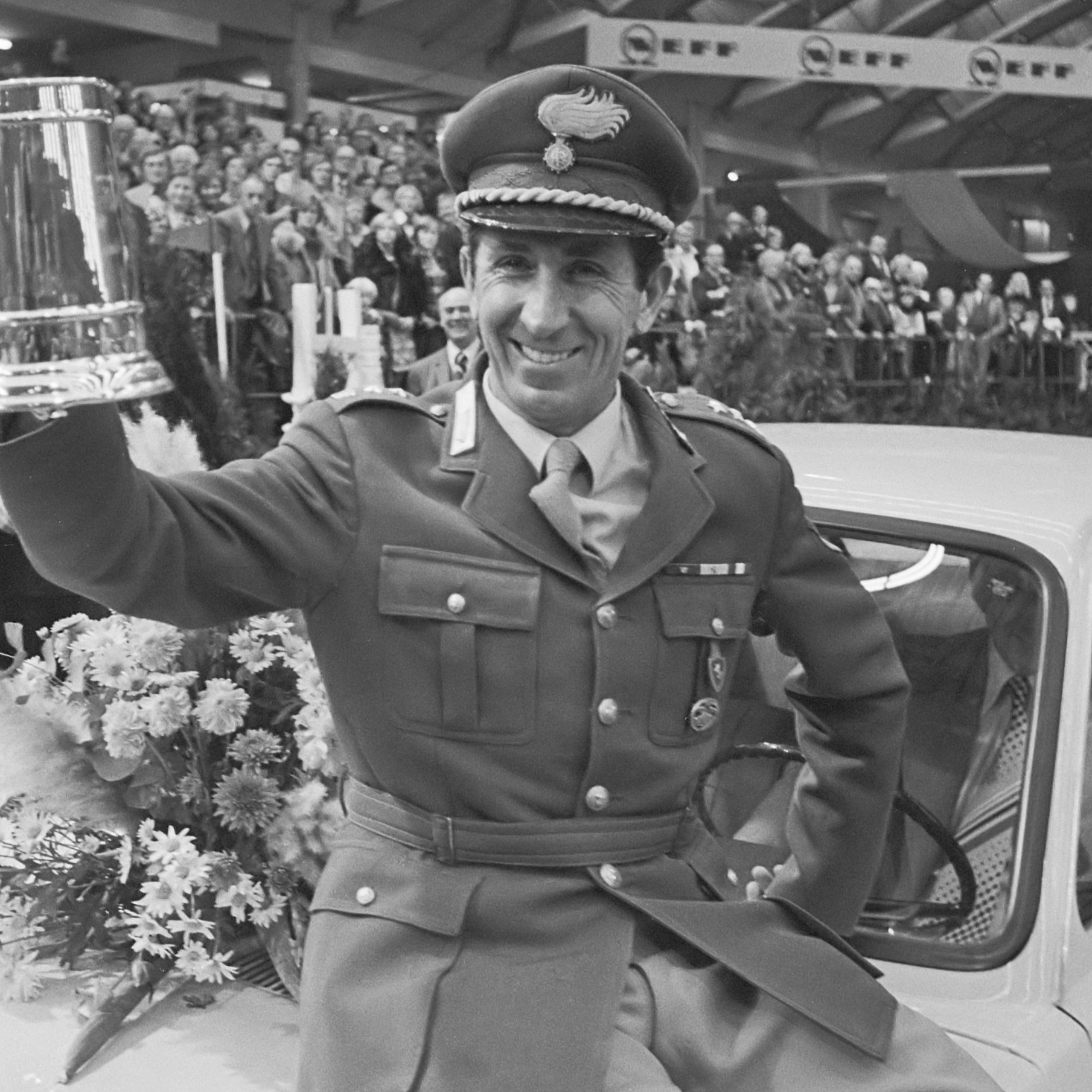 Jumping Amsterdam ; winnaar Grote Prijs Amsterdam de Italiaan Raimondo d'Inzeo met beker zittend op gewonnen Fiat 26 november 1976